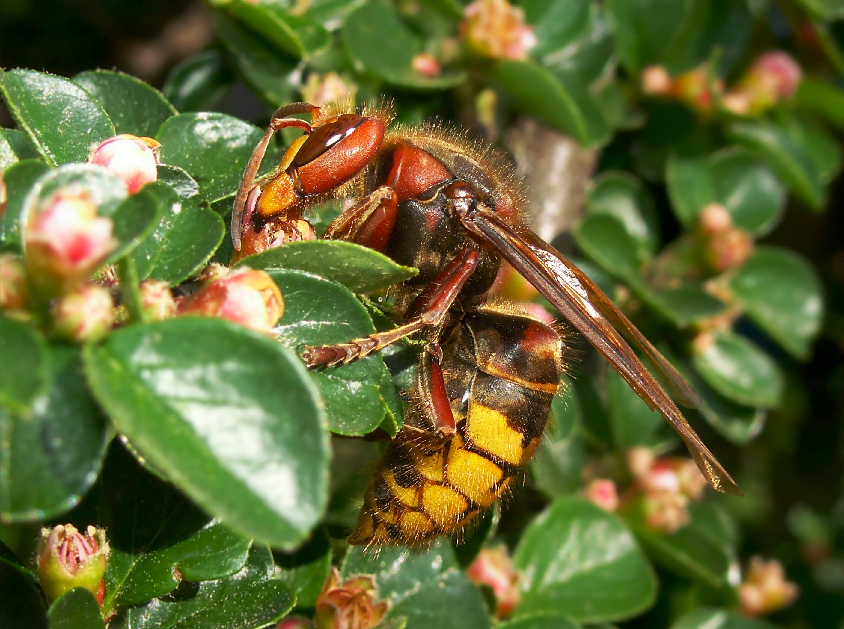 Vespa crabro germana Queen - Hornet on a Cotoneaster, Germany. The hugest Wasp on earth with wonderful colours! This Photo was taken about 50 Kilometers south from Frankfurt/Main in Germany in my own garden. High quality image file; Hornissenkoenigin Vespa crabro germana auf Zwergmispelstrauch, Seitenansicht; Diese Königin hat den Winter überstanden und nutzt die Zwergmispelblüte als Nektarquelle zur Nahrung. Aufgenommen 50 Kilometer südlich von Frankfurt/Main. Weitere Informationen unter und